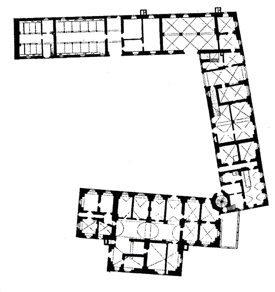 Erdgeschogrundriss Altes Jagdschloss Wermsdorf